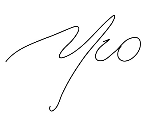 Буква зю